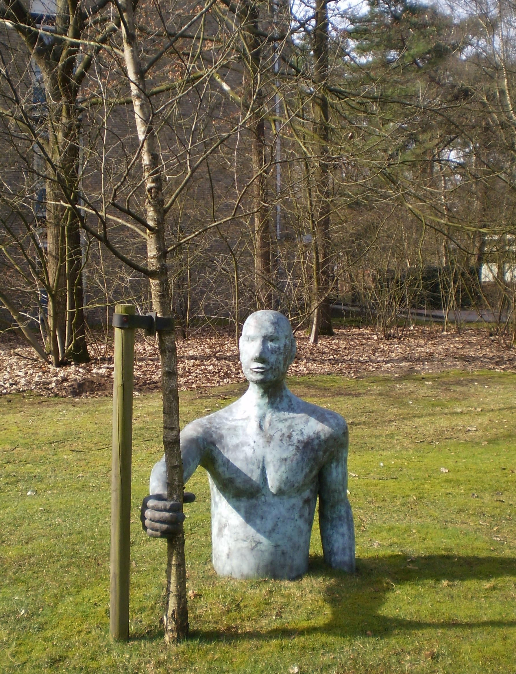 Beeld bij Sherpa locatie Eemeroord